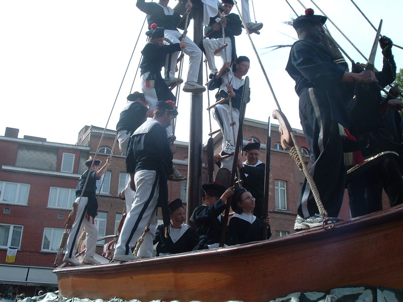 Ducasse d'Ath